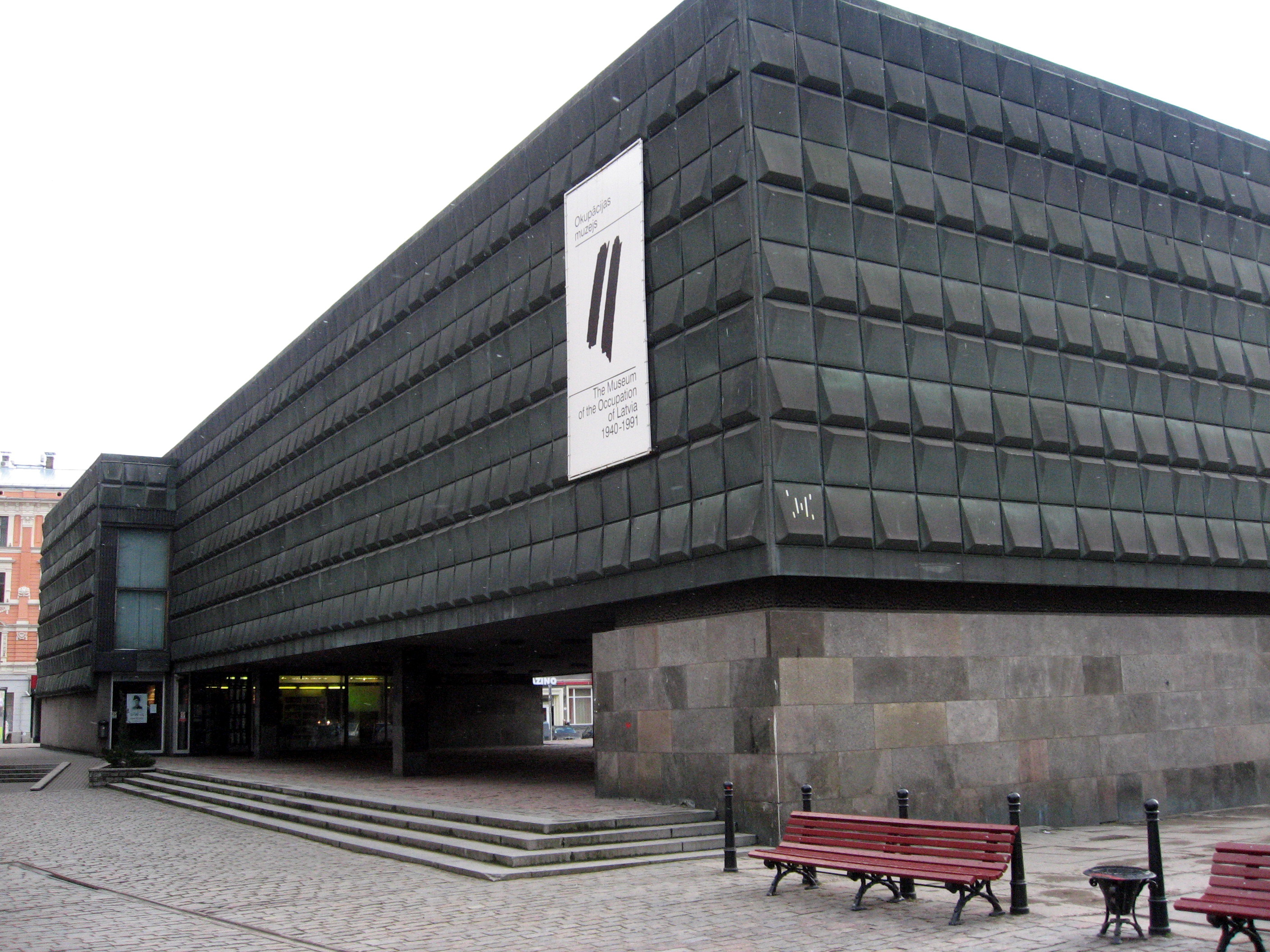 Muzeum okupace